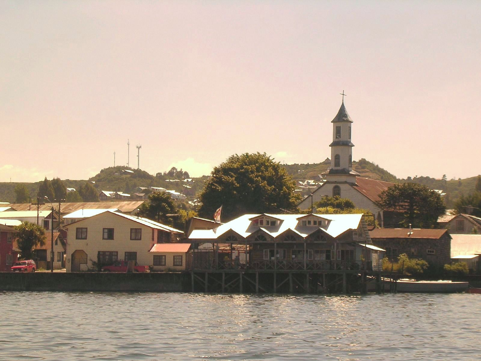 Costanera de Dalcahue en la isla de Chiloé (Chile), al fondo la Iglesia Nuestra Señora de los Dolores.DSCN9790